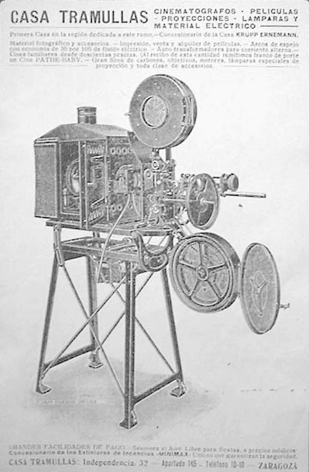 anuncio tienda de tramullas, actividad: reportajes, bodas, comuniones, venta, alquiler de maquinas, peliculas.